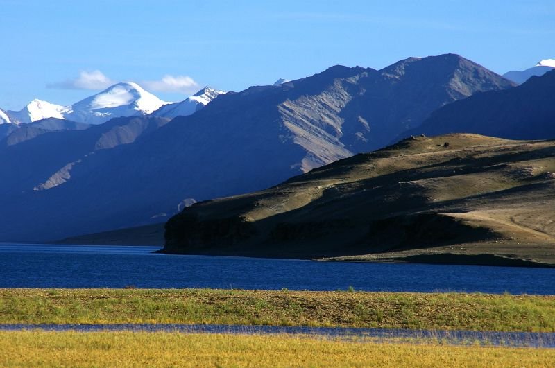 Lake Tso Moriri in Ladakh, India.